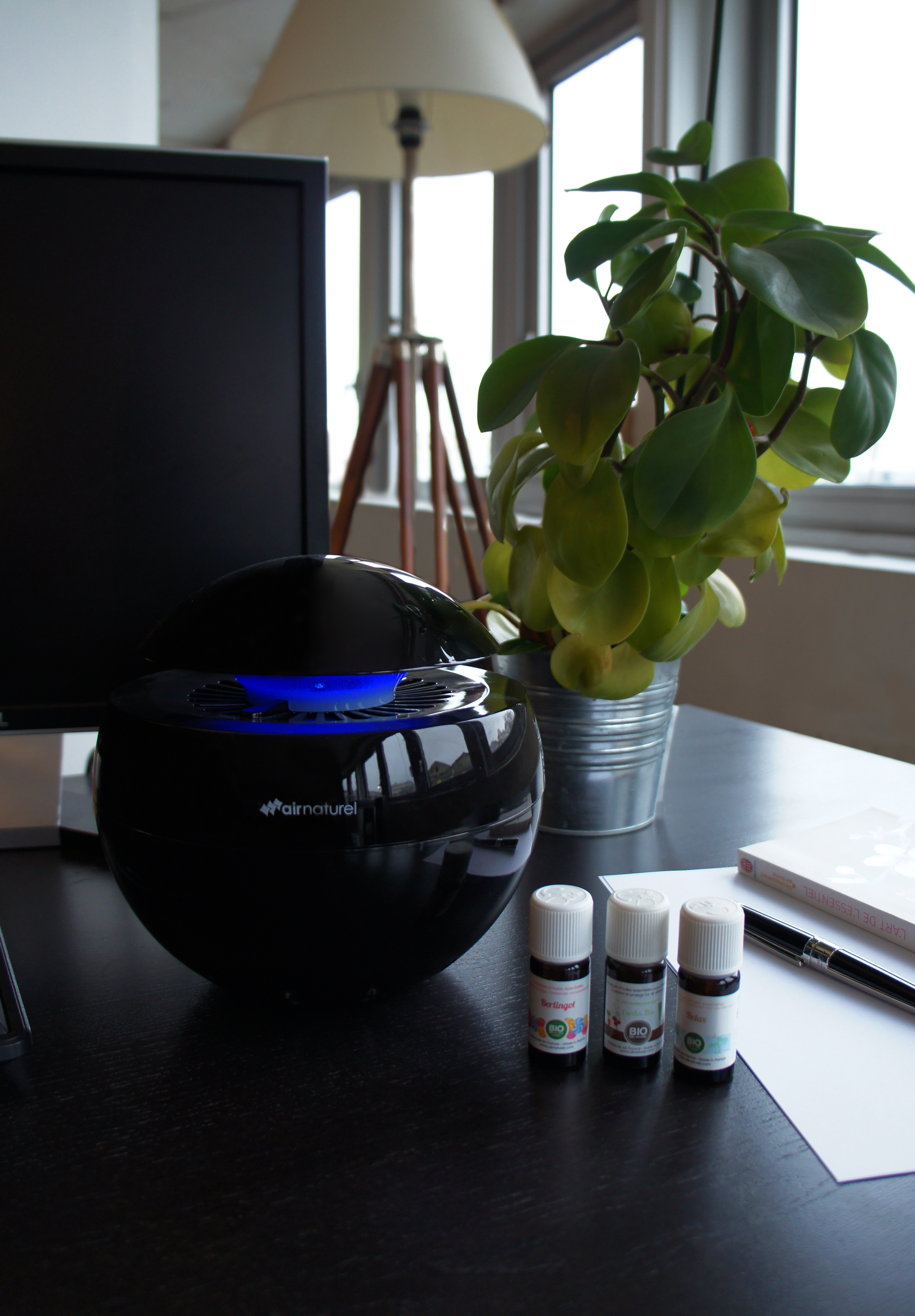 vue de buldair